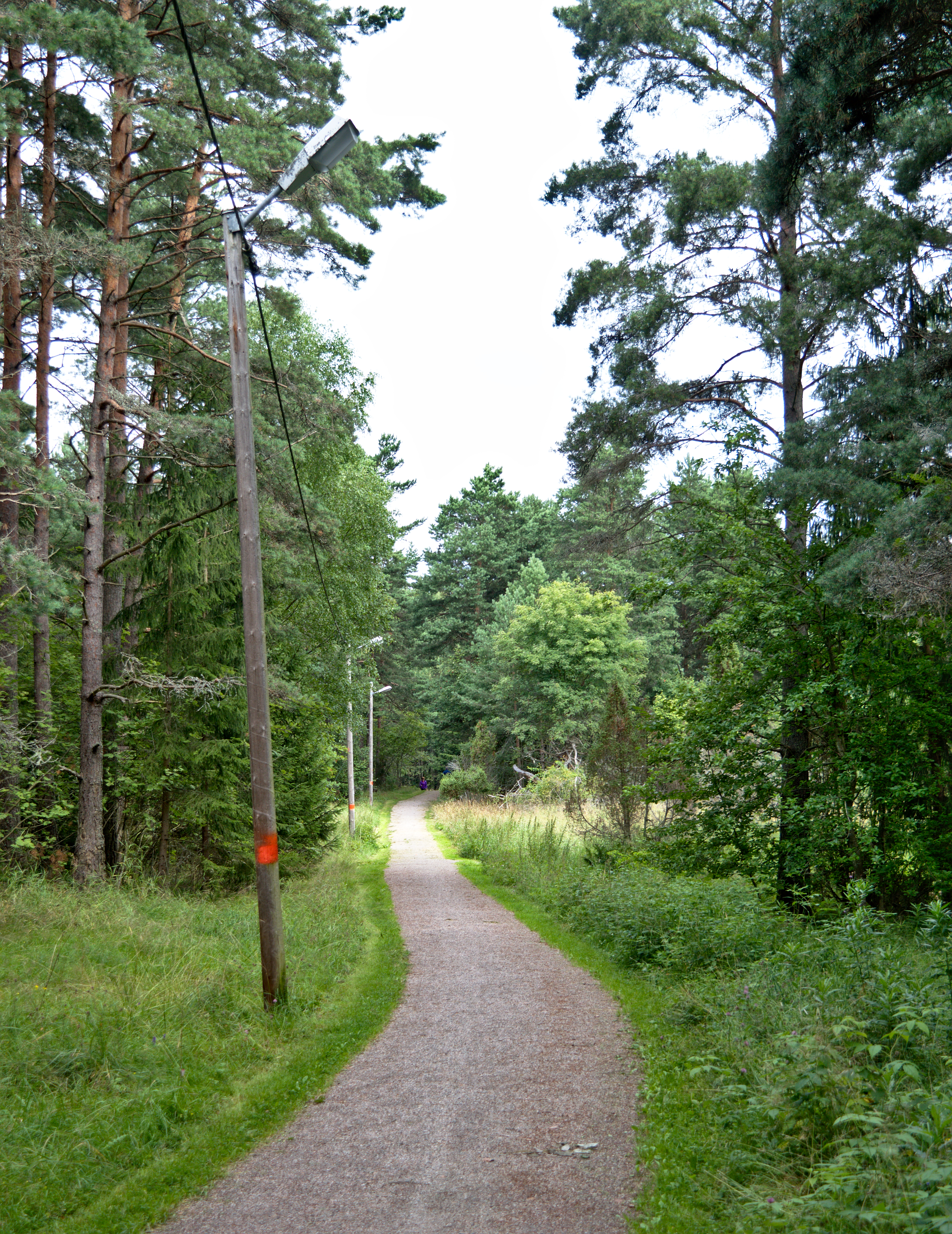 Naturreservatet Årby i Eskilstuna kommun. Elljusspår längs Gyllenhielmska leden.